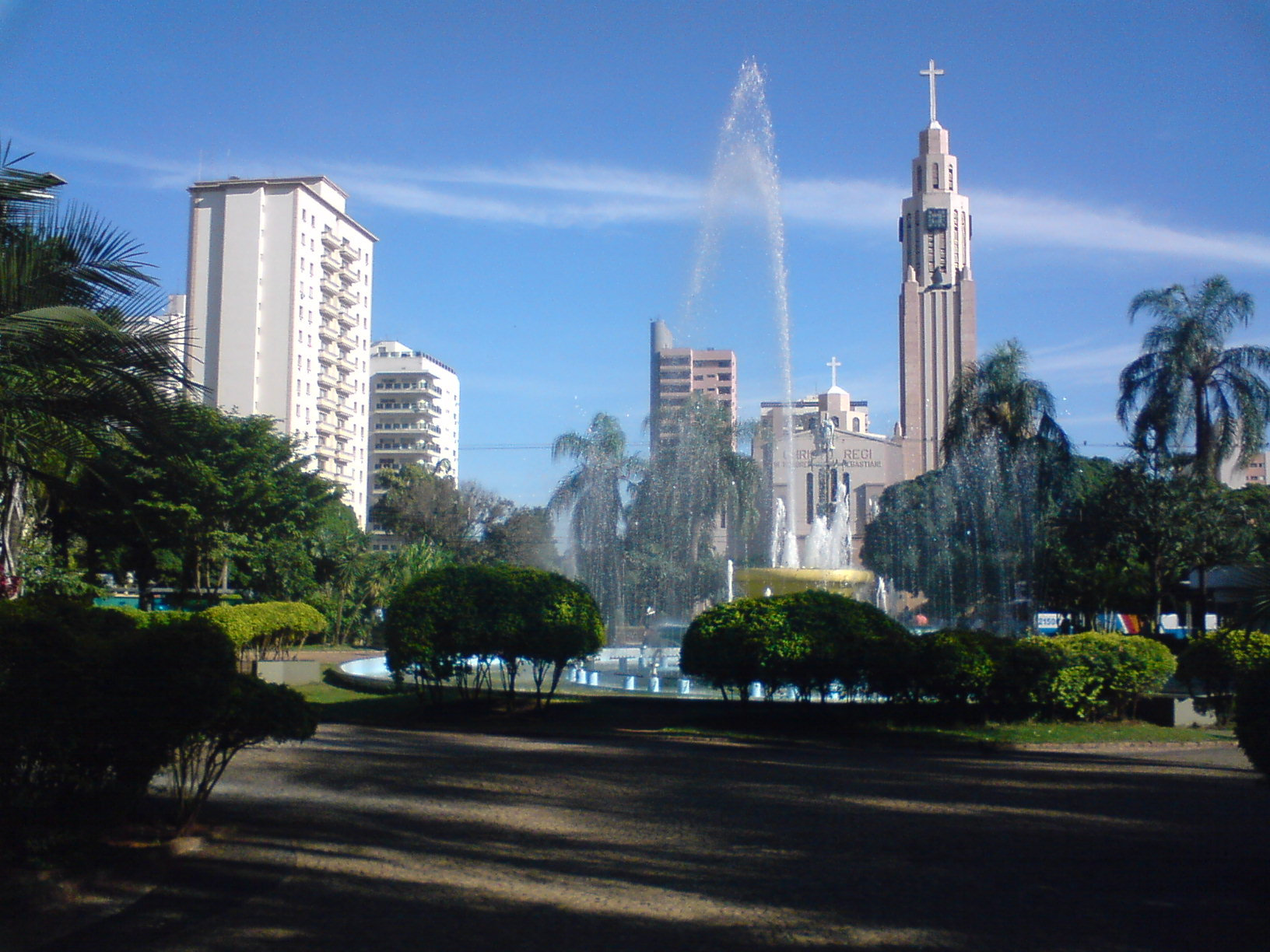 Catedral São Sebastião